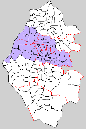 福井県足羽郡の町村制時点の町村。